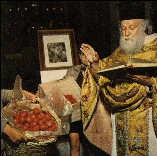 Papa Sepa (o Zefi) Petta (1882 – 1959), Pasqua 1960 a Piana degli Albanesi.